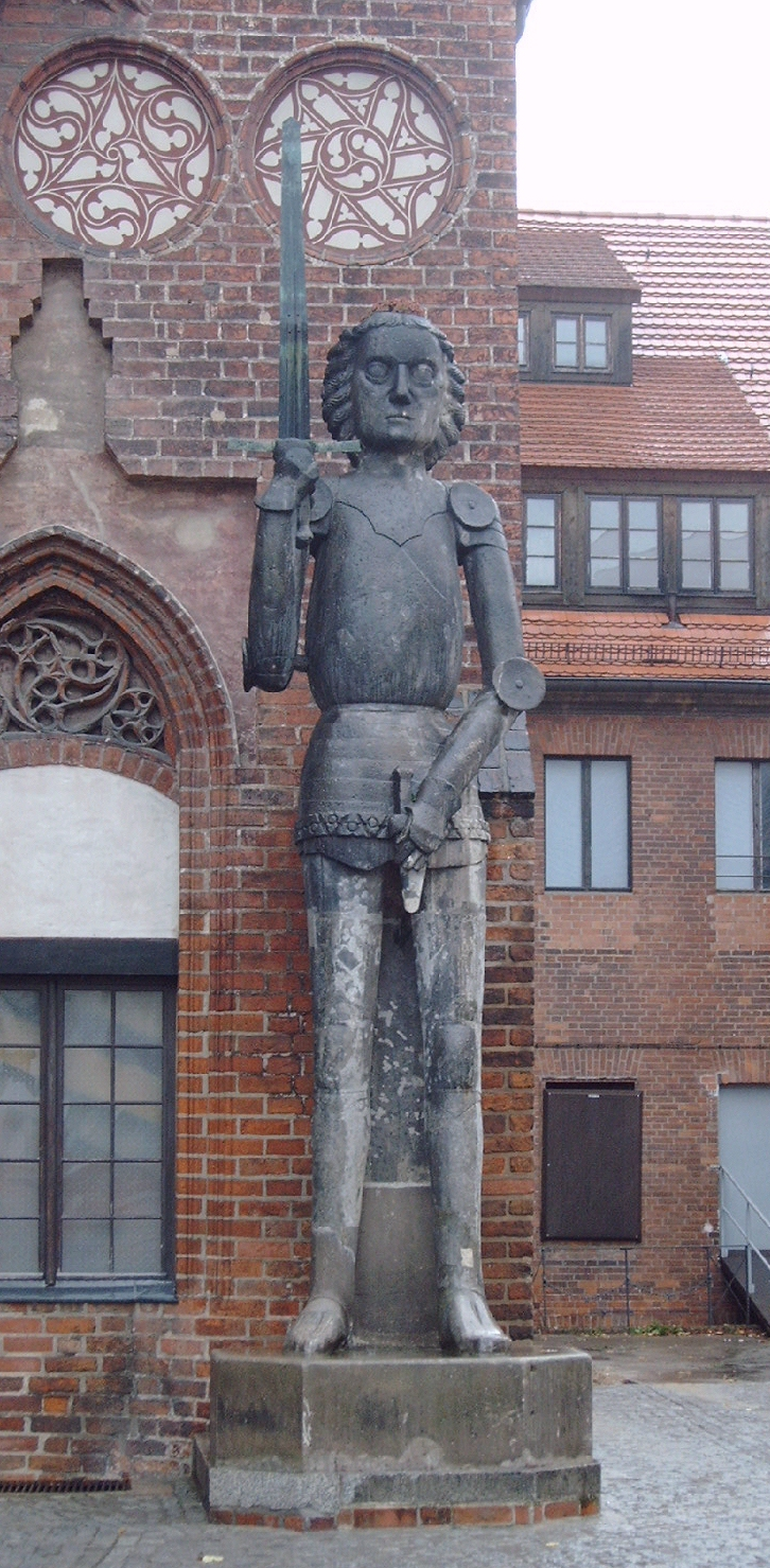 Roland in Brandenburg an der Havel vor dem Rathausportal in der Altstadt, 5,34 m hoch und aus Sandstein